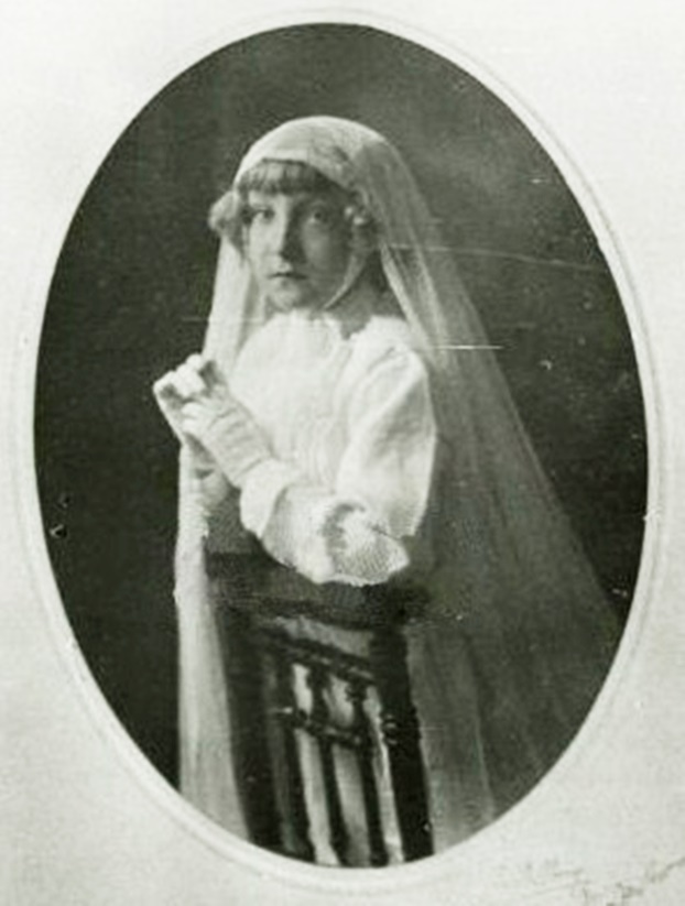 María de la Esperanza, el día de su primera comunión.